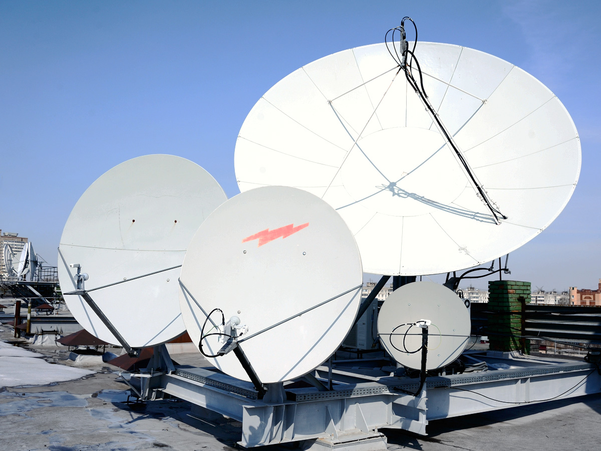 Зеркальные спутниковые антенны